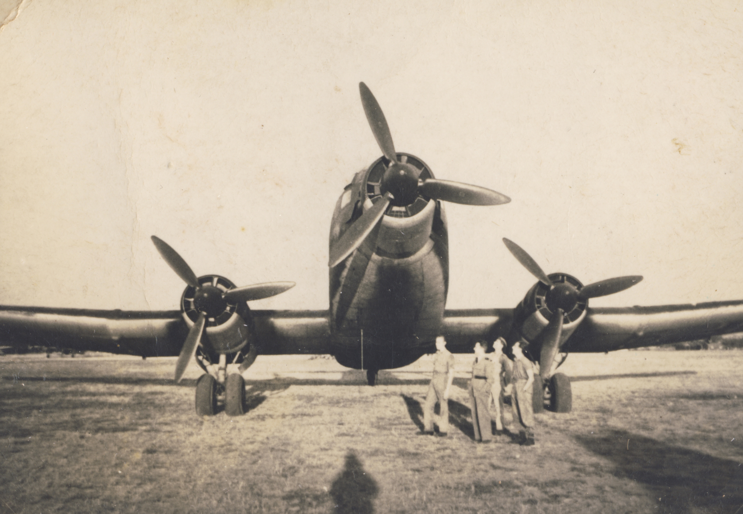 1940-es évek, második világháború, Pápai reptér